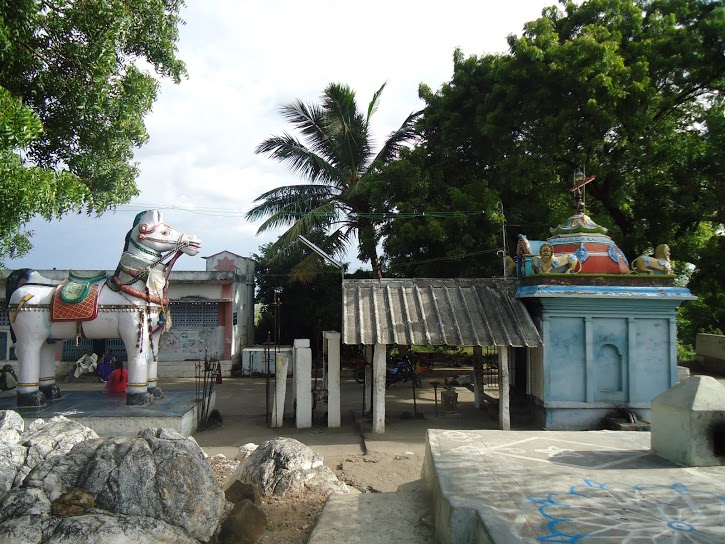 குன்னிமரத்தான் ஆலய தோற்றம்.JPG